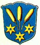 Coat of arms Leezdorf, Wappen der Gemeinde Leezdorf